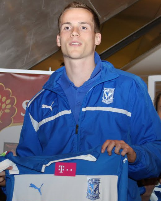 Tomasz Kędziora, piłkarz Lecha Poznań